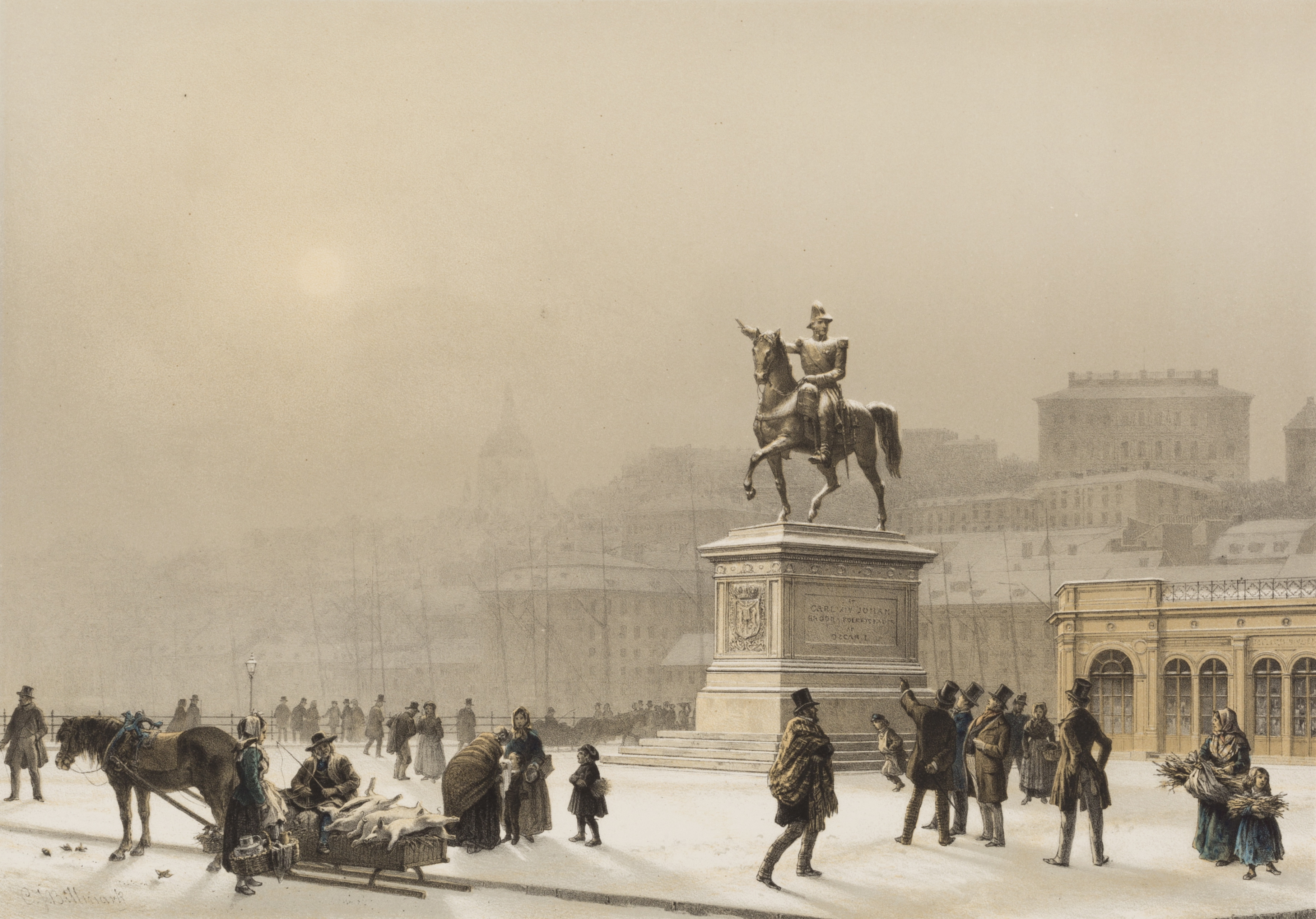 Karl Johans torg (med Fiskarhuset längst till höger) Konstnär: Billmark, Carl Johan Material och teknik: Färglitografi Underlag: Papper Mått i mm: 345x45